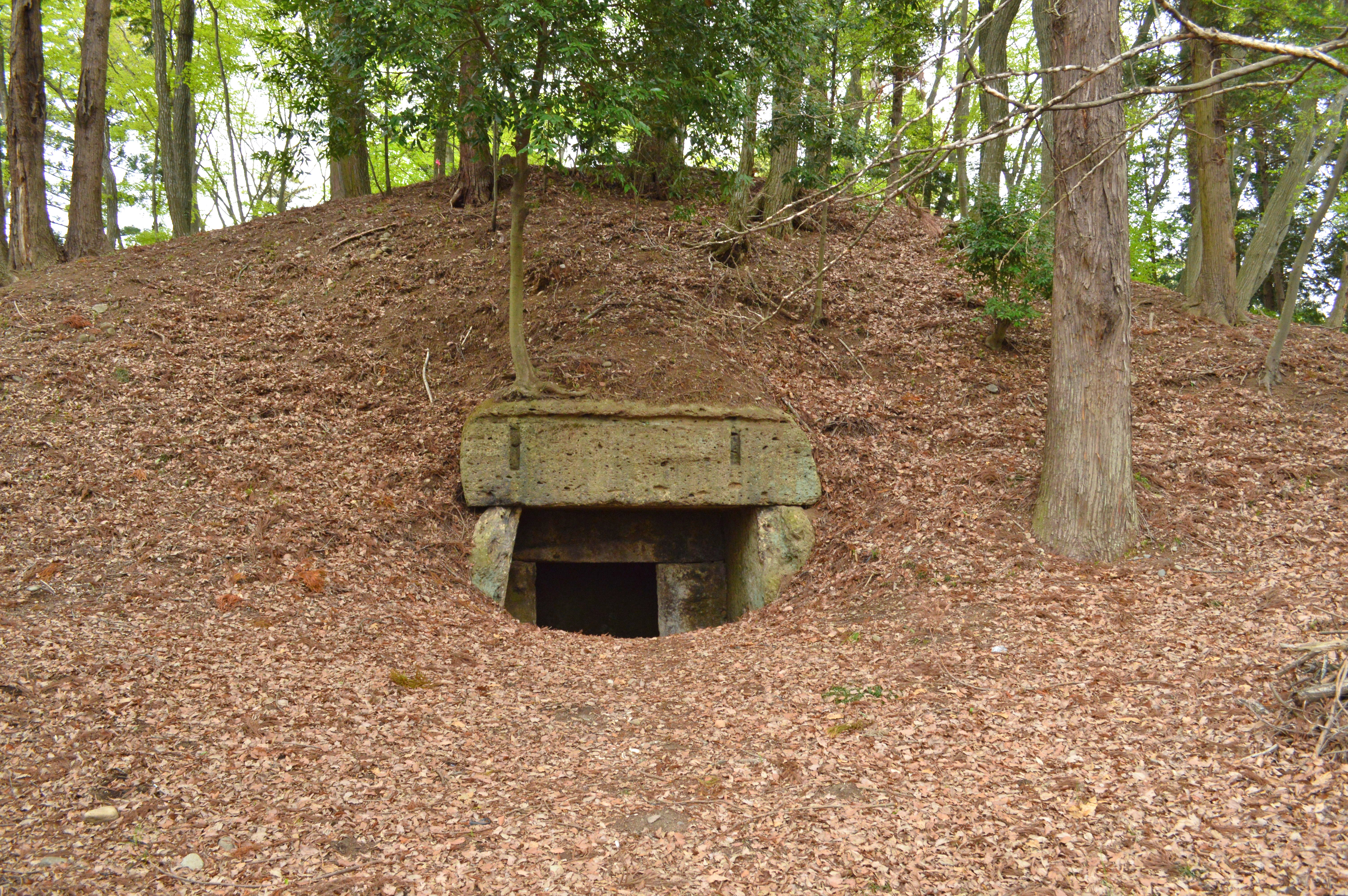 車塚古墳 (壬生町) 石室入り口